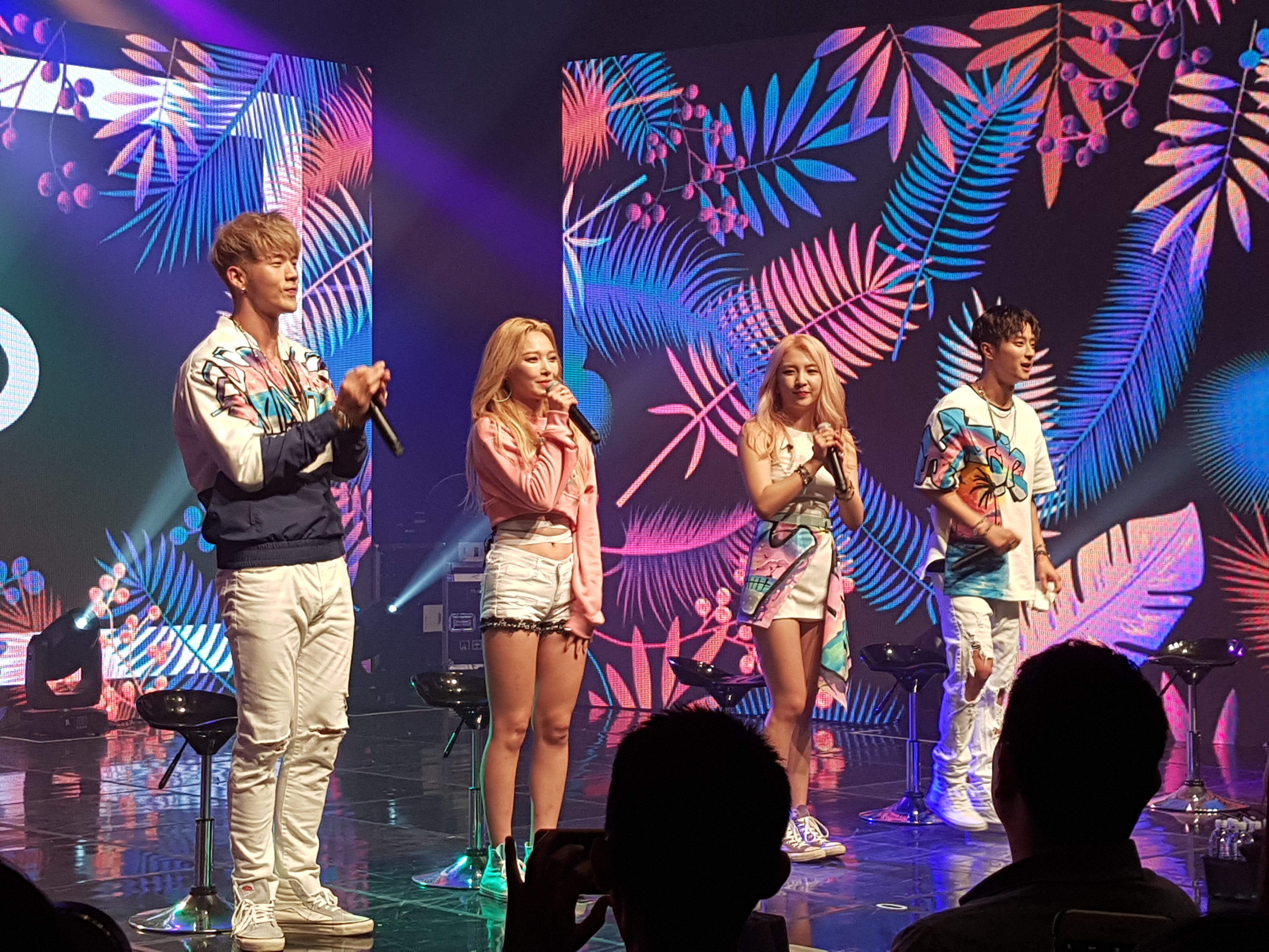 2017년 7월 19일 카드 첫번째 미니 앨범 HOLA HOLA 데뷔 쇼케이스